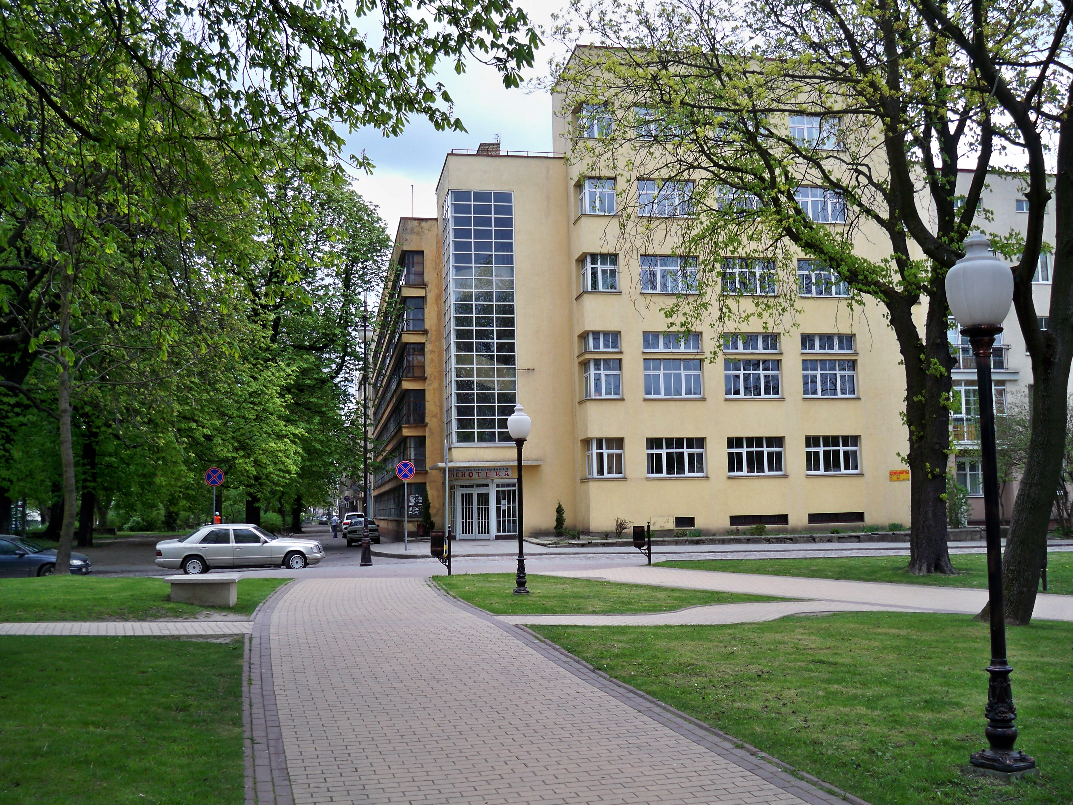 Калининградская областная научная библиотека